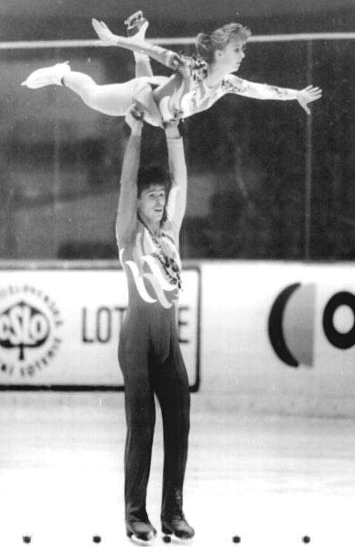 Mandy Wötzel, Axel Rauschnbach ADN-ZB CTK-Tele-6.11.88 CSSR: Eiskunstlauf- Mandy Wötzel und Axel Rauschnbach vom SC Karl-Marx-Stadt gewannen die Paarlauf-Entscheidung bei den internationalen Eiskusntlauf-Wettbewerben um den "Prager Schlittschuh" in der CSSR-Hauptstadt.